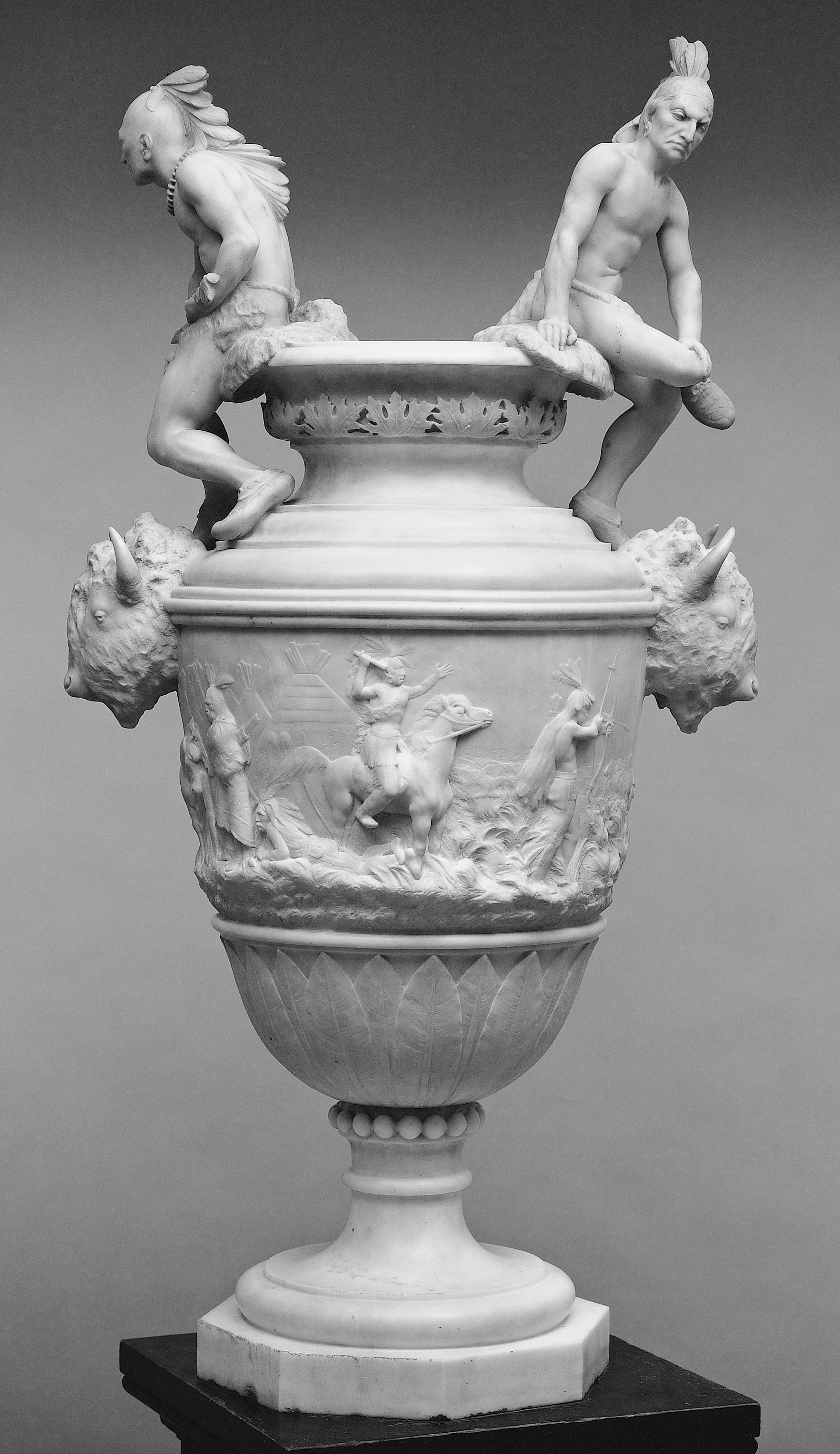 Sculpture; Sculpture